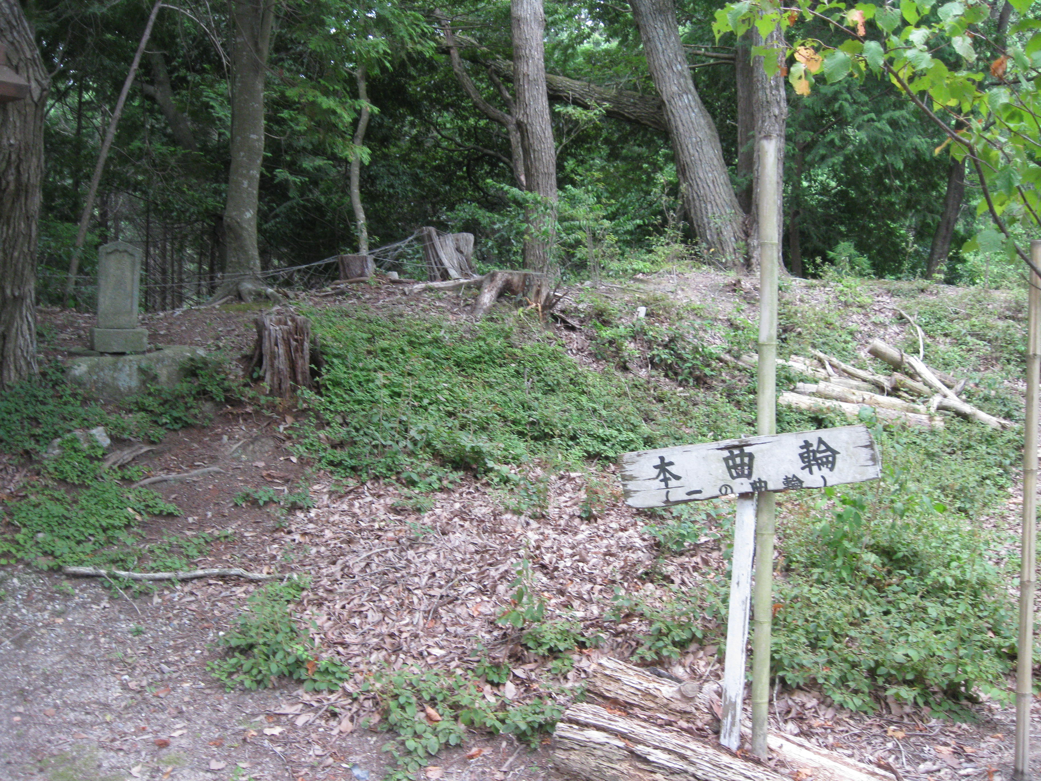 日近城本曲輪